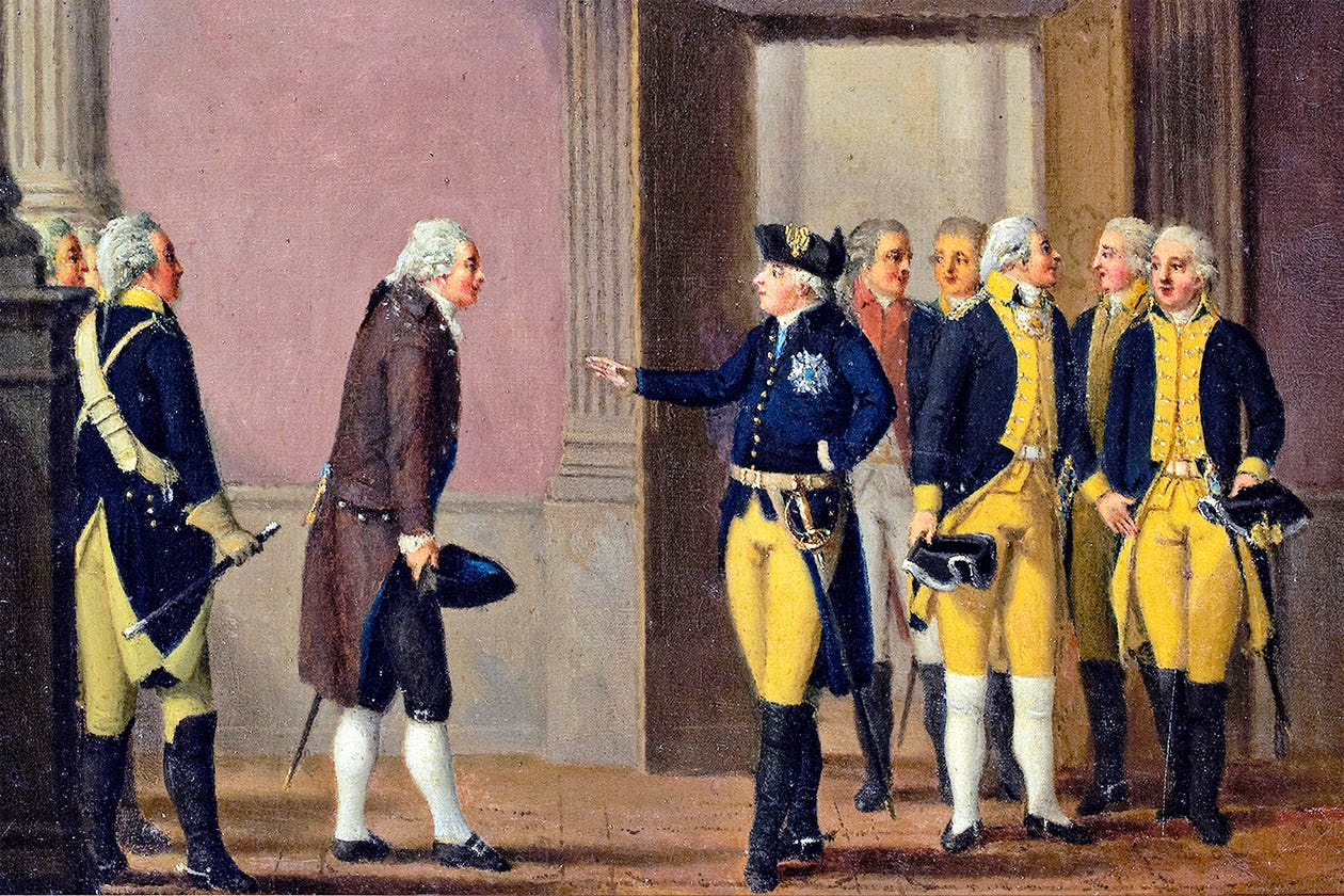 Gustaf III innan revolutionen började 1772. Påskrift på baksidan som säger; "Då Hans Majtt konung Gustaf III geck utur Sina rum för at börja Revolution 1772 behagade Han säga till Sin Kammarherre: Om jag är idag så olyckelig och förlorar lifvet, Så Säg min bror Carl at jag inte omkommit genom Svensk manns åtgärd. Hillerström"